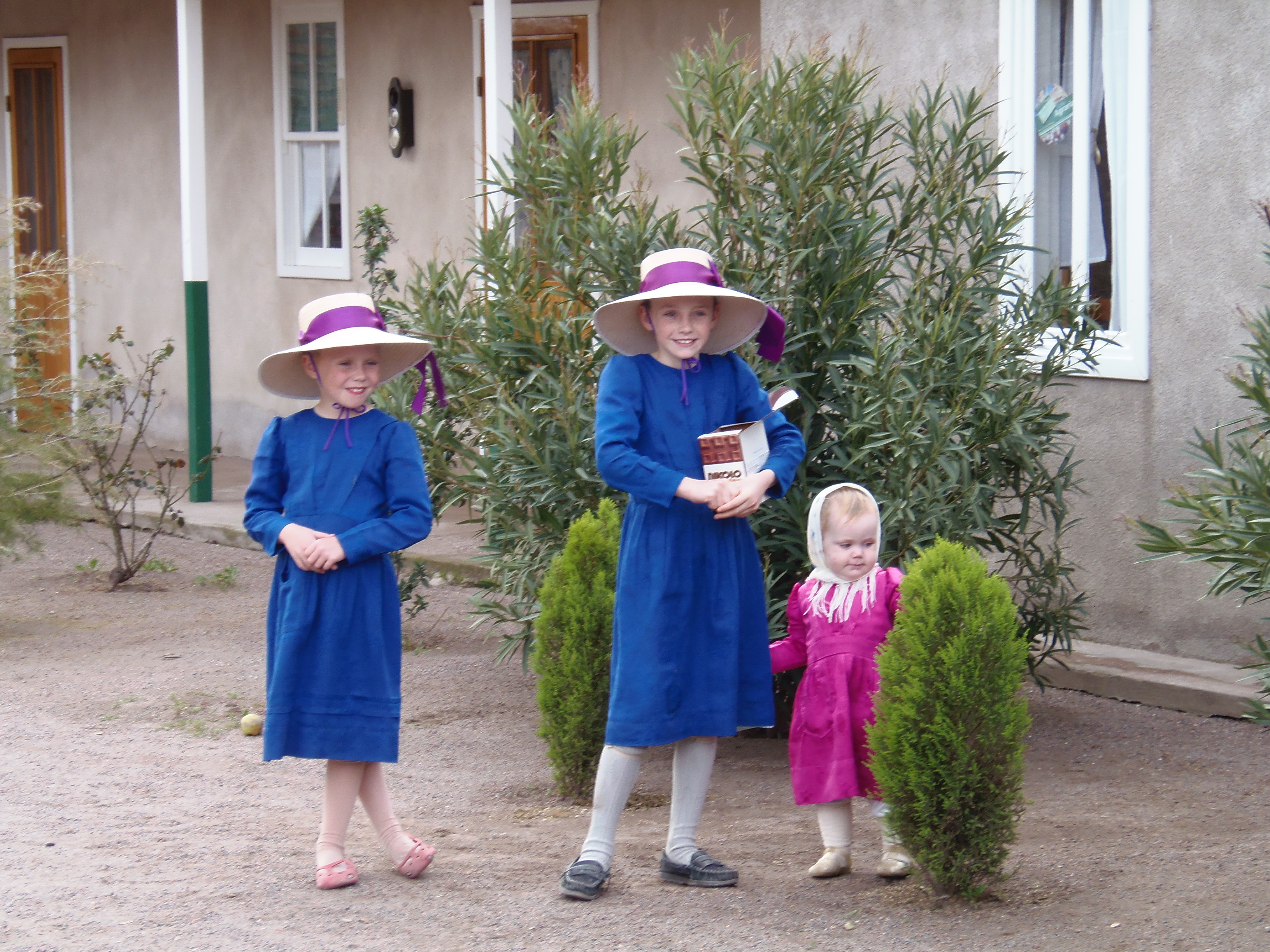 Niños de la Colonia Menonita.